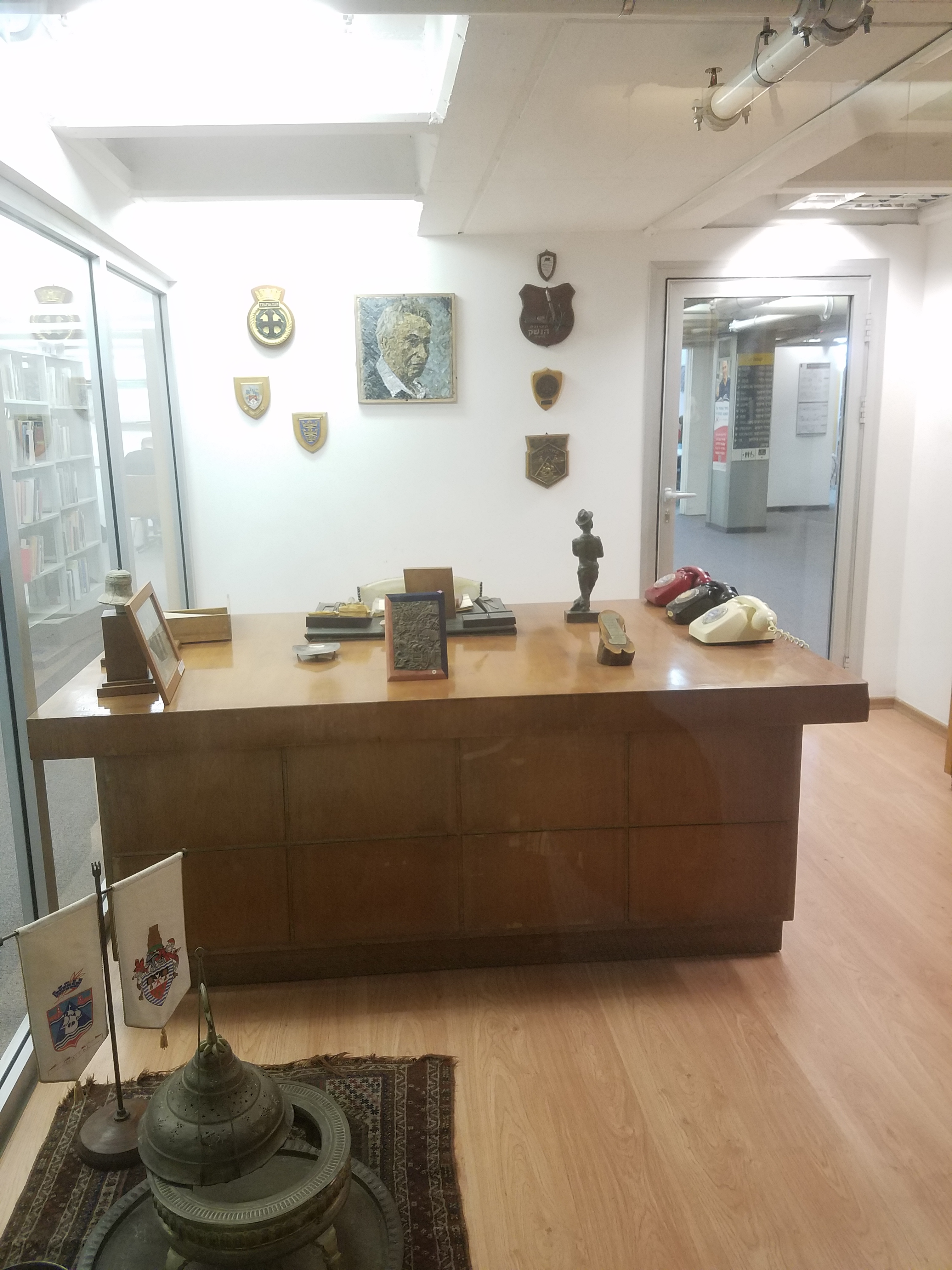 חדרו המשומר של אבא חושי באוניברסיטת חיפה